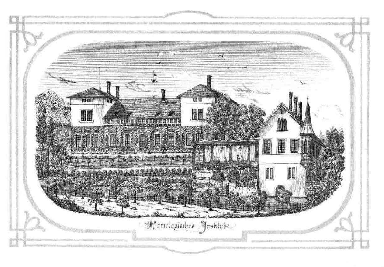 Abbildung des Pomologischen Instituts in Reutlingen aus den Illustrirten Monatheften für Obst- und Weinbau, 1867